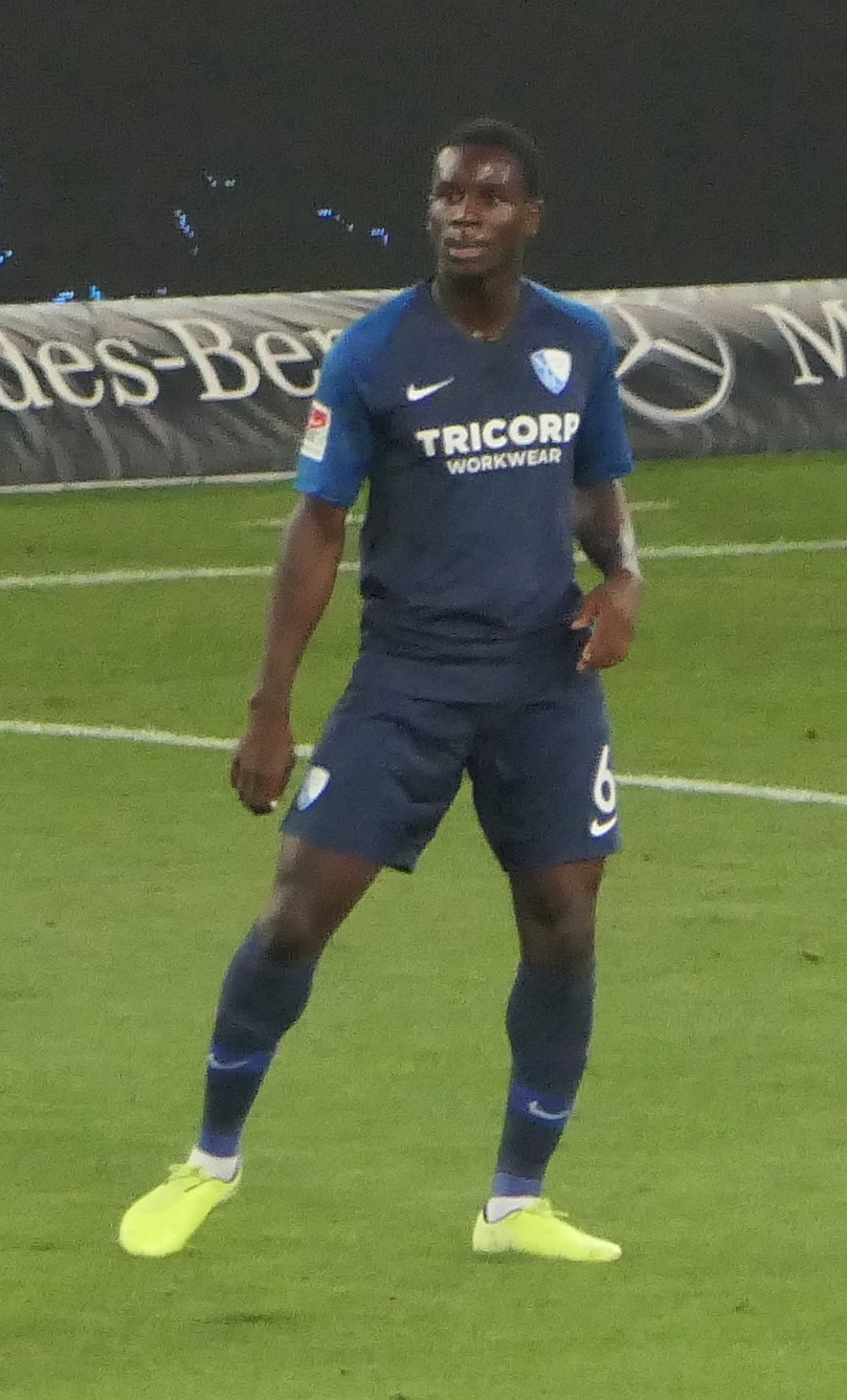 Der Fussballprofi Jordi Osei-Tutu im Trikot vom VfL Bochum beim Auswärtsspiel gegen den VfB Stuttgart am 02.09.2019.